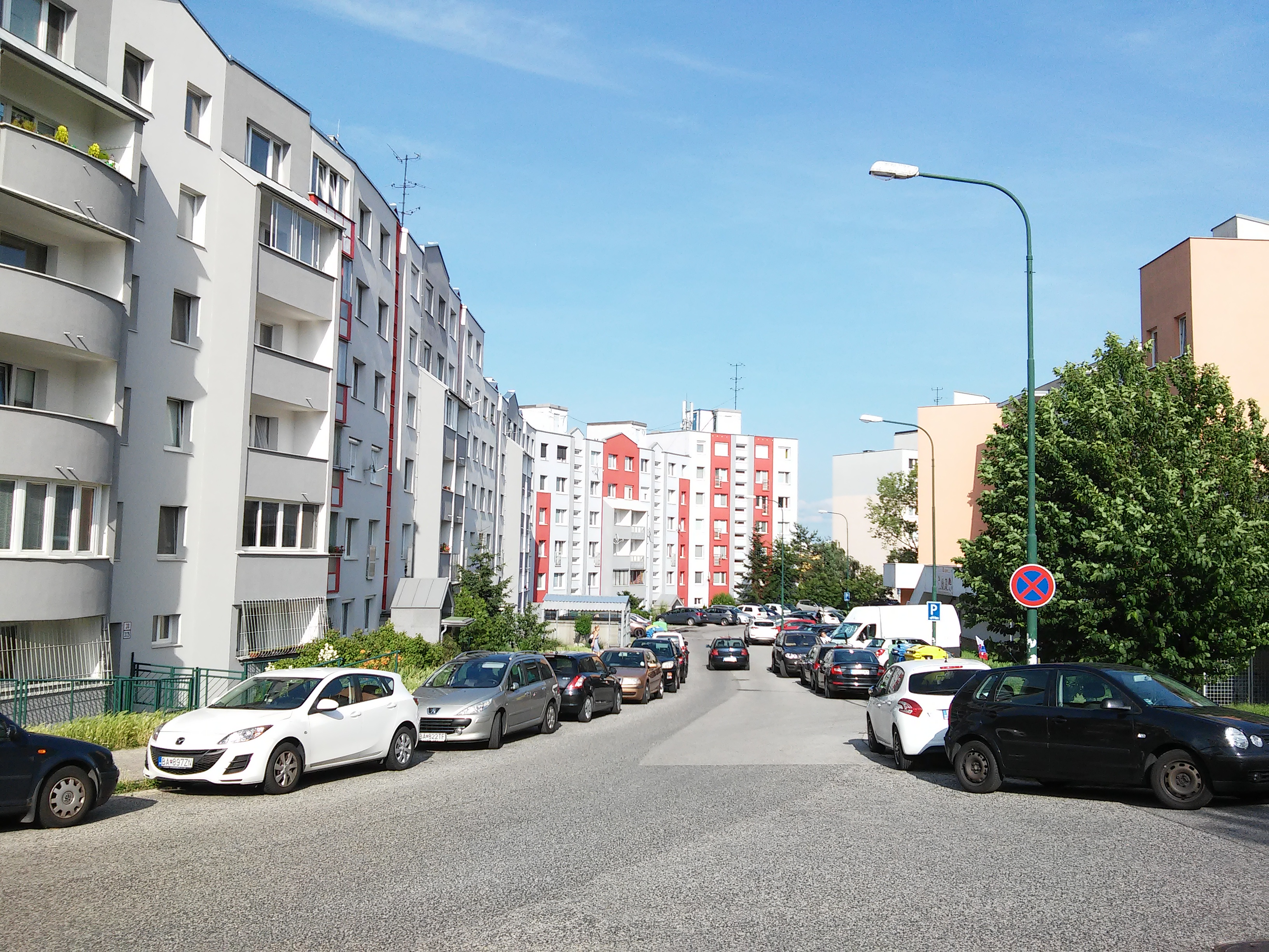 Ľudovíta Fullu, Karlova Ves, Bratislava